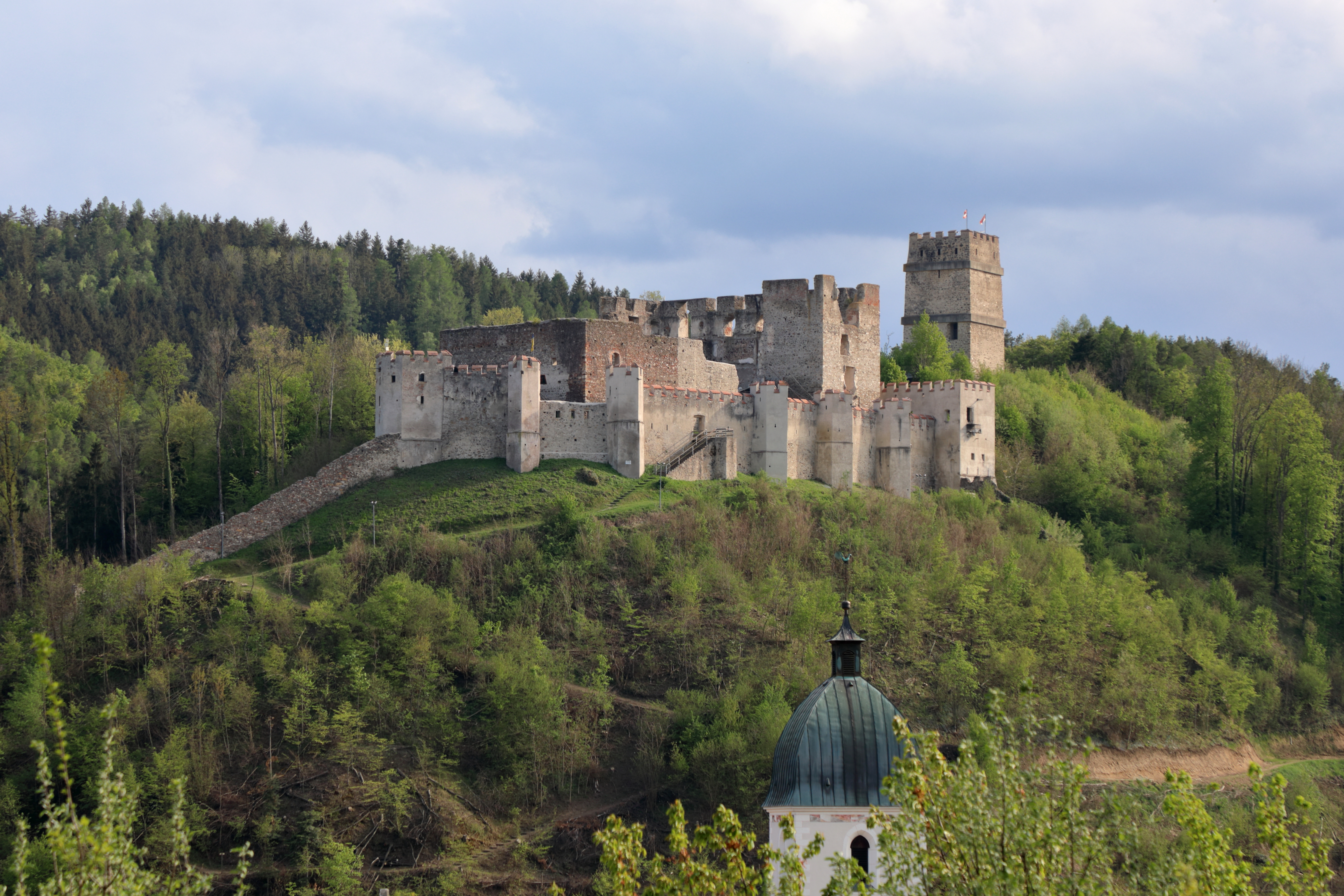 Nordansicht der Burgruine in der niederösterreichischen Stadt Kirchschlag in der Buckligen Welt. Rechts der durch einen Halsgraben von der übrigen Burganlage getrennte Bergfried und der heutzutage als Aussichtsturm genutzt wird.